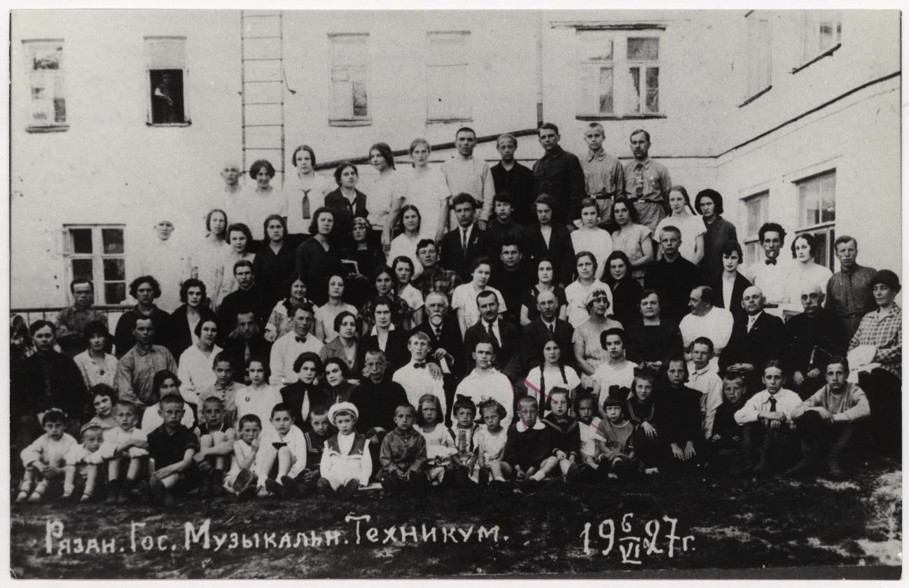 Рязанского музыкального колледжа имени Г. и А. Пироговых 19.06.1927